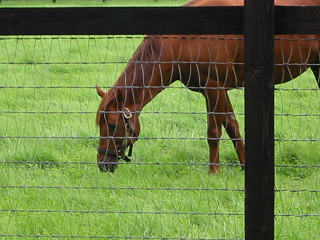 日本の種牡馬、グラスワンダー